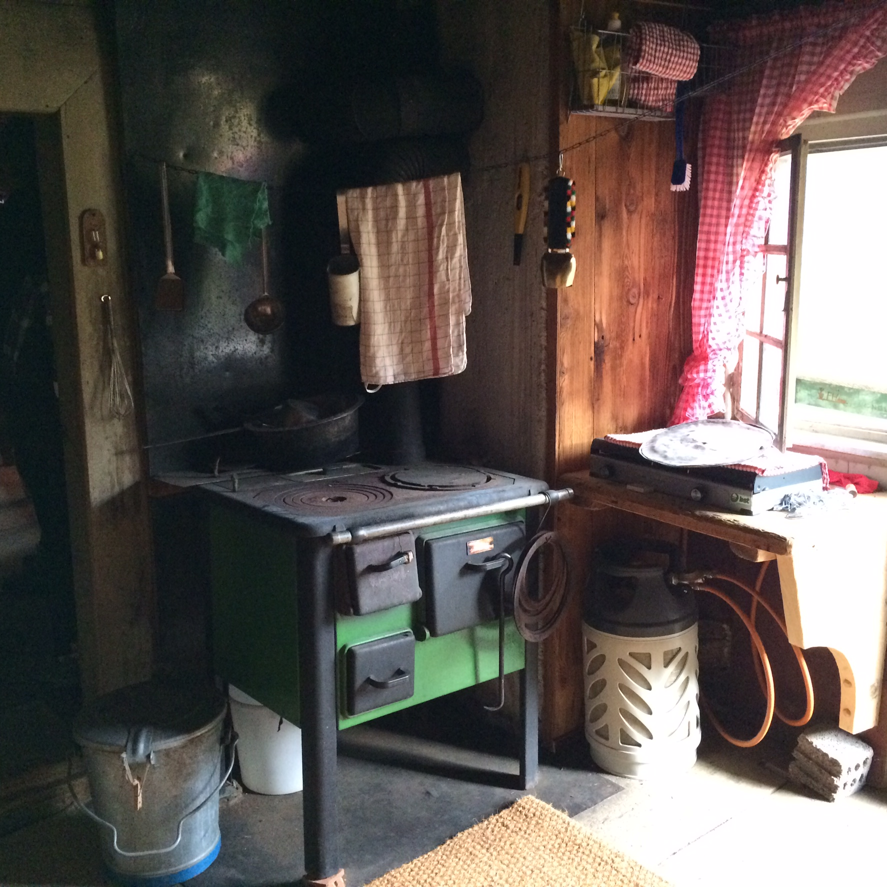 Wohnhaus innen von Ernst Ludwig Kirchner